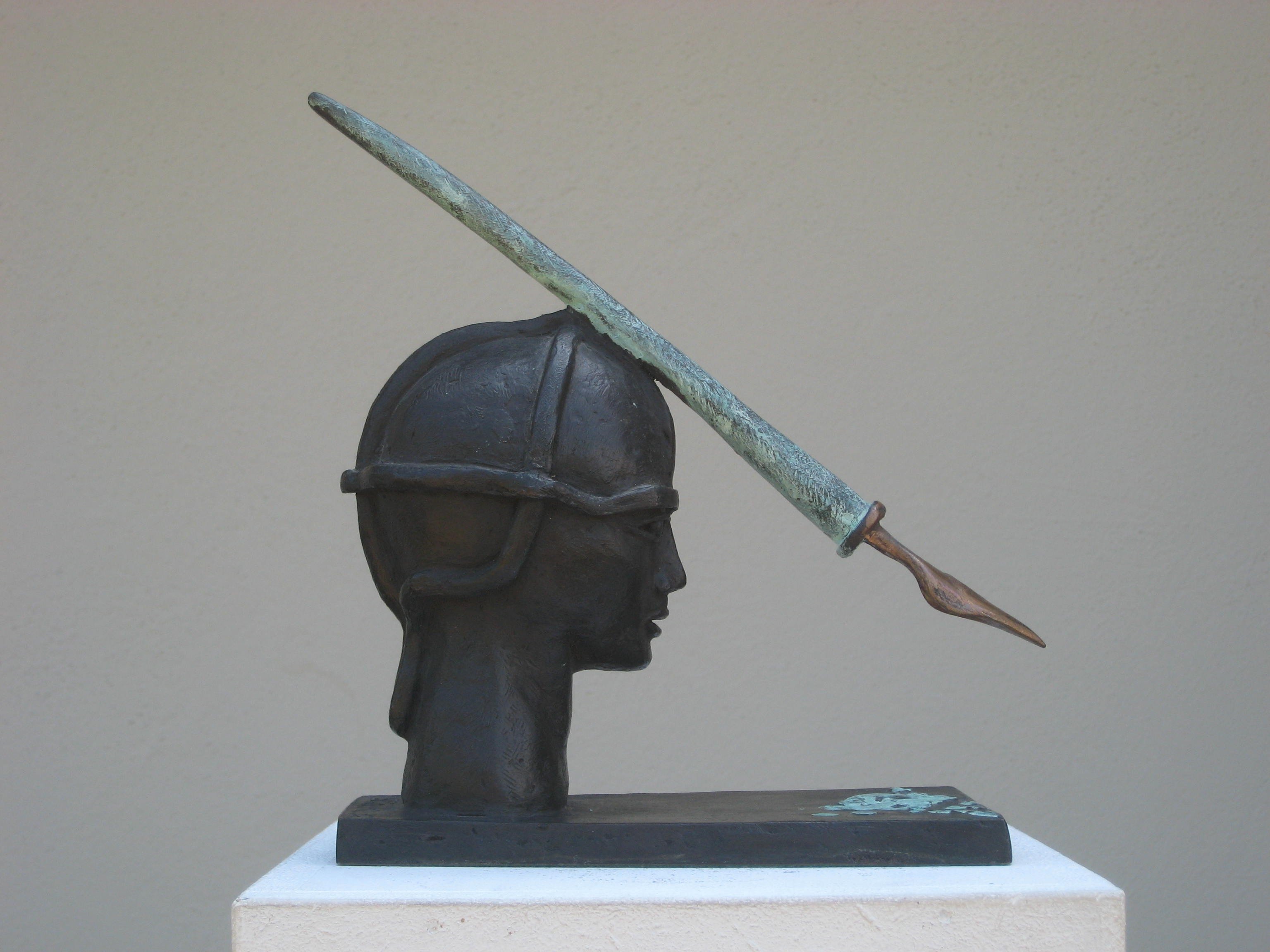 Carl-Einstein-Preis für Kunstkritik von Ursula Stock, Bronze, Höhe x Breite x Tiefe: 21 x 18 x 8 cm, 1992.